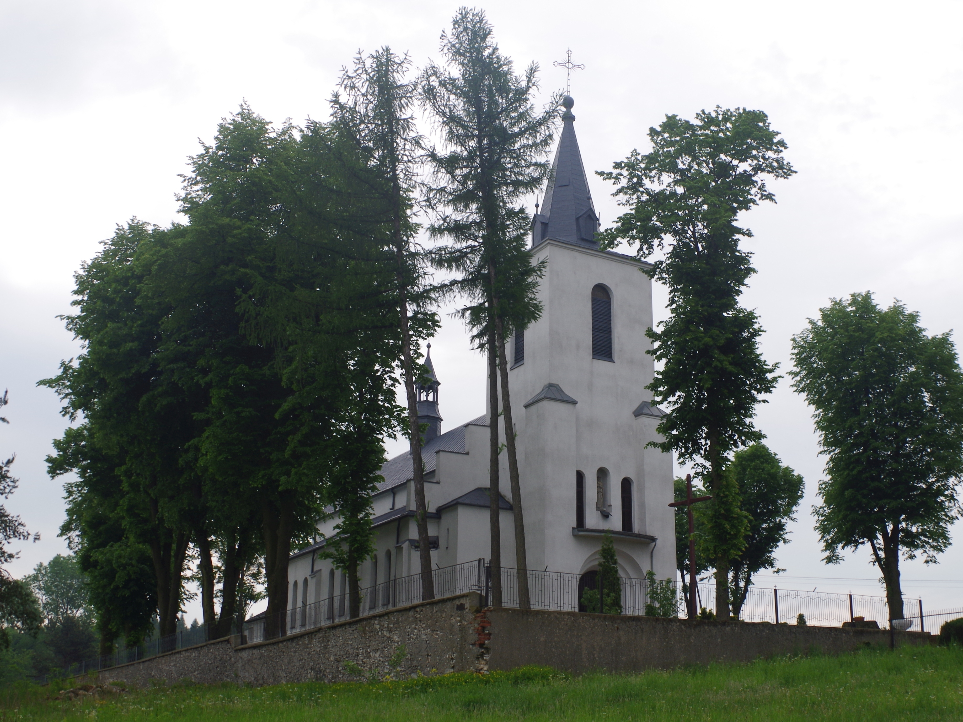 Kościół w Kluczach